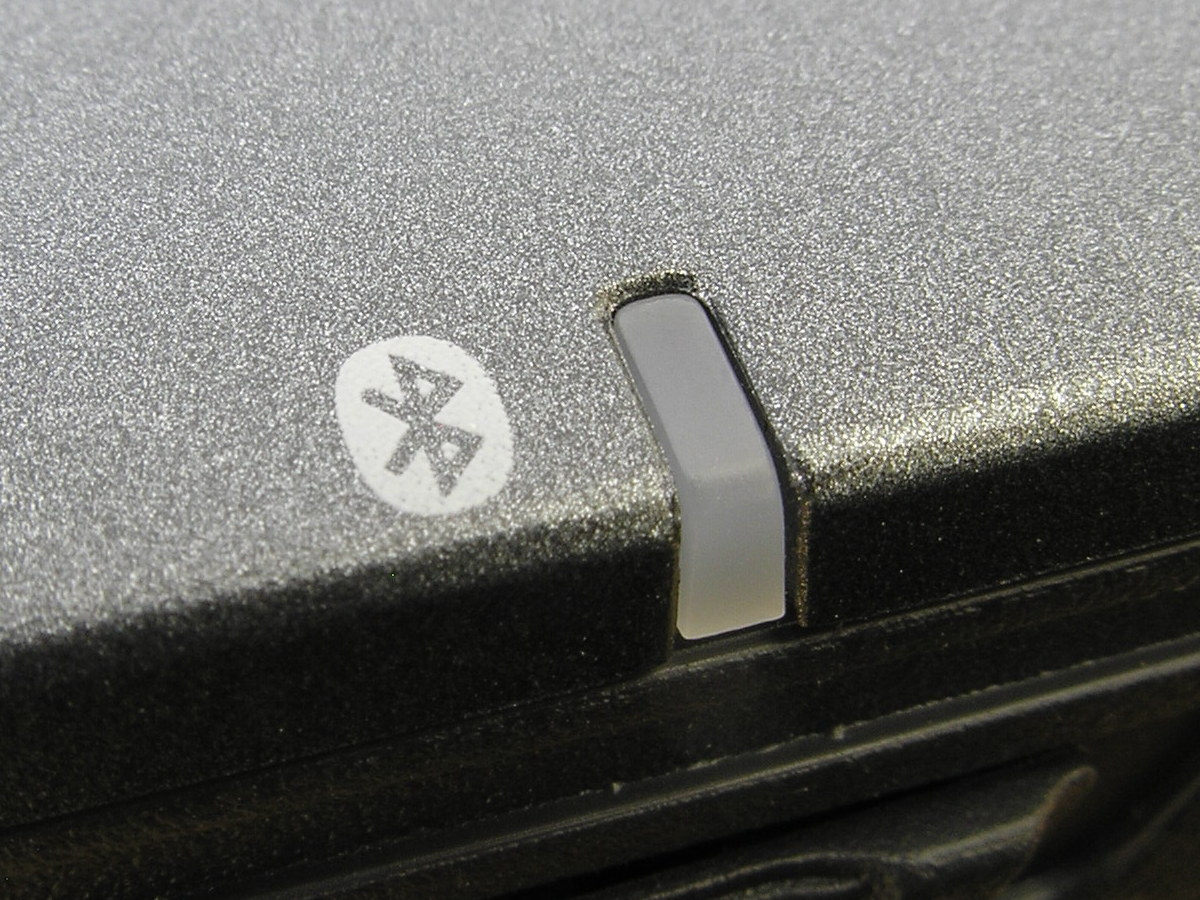 Bluetooth-Logo mit Status-LED auf einem Notebook (Acer Extensa 5220)